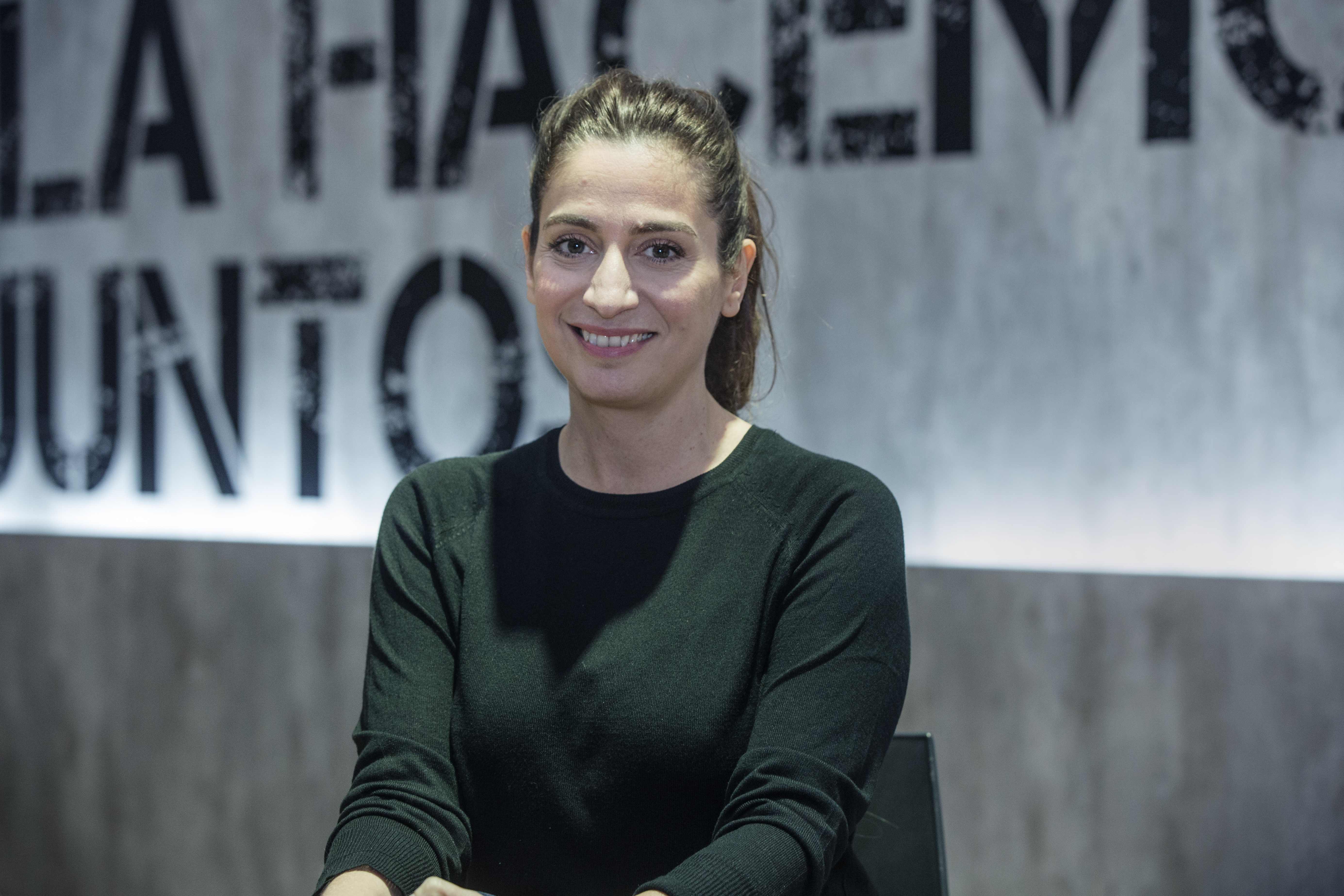 Buenos Aires, 9 de mayo de 2017.- "Cómo contar la vida cultural en los medios: la experiencia de la revista Cuaderno". Conversaciones entre Muriel Santa Ana y Diego Manso, en el stand del Ministerio de Cultura de la Nación.